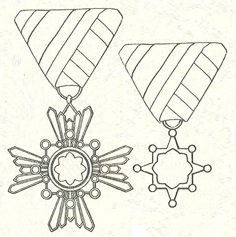 Scan van Blz. 192 en 191 van het boek "Handbuch der Ritter- und Verdienstorden " uitgegeven 1893 door Weber.Tekening van de in 1902 overleden Maximilian Gritzner. Robert Prummel 10 jul 2008 16:40 (CEST)